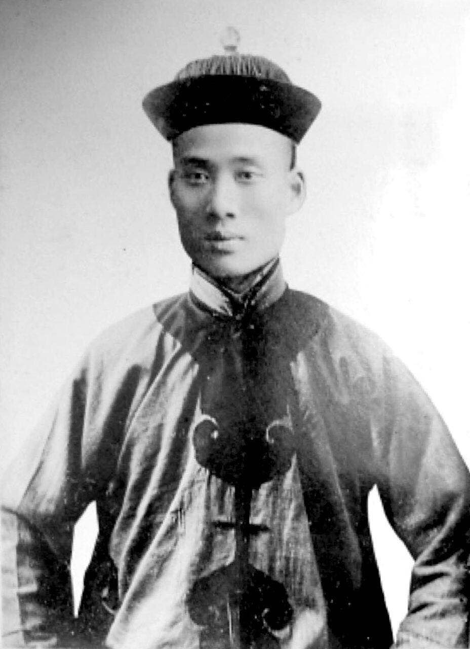 着军服时的张伯苓